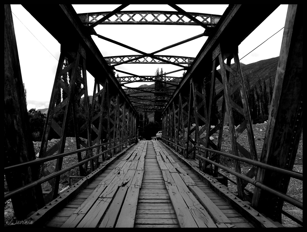 "Ausencia". Foto del puente sobre el río Huasamayo, Tilcara, Jujuy. Allí se filmó el video "Cuando pase el temblor", de Soda Stereo (1986). Tu ausencia. Mi ausencia. Nuestra ausencia. Y un puente. El puente que nos lleva a ese lugar. Y que tan lejos estamos de atravesar. ¿Cuánto tiempo más llevará? Tilcara ::: Jujuy ::: Argentina.